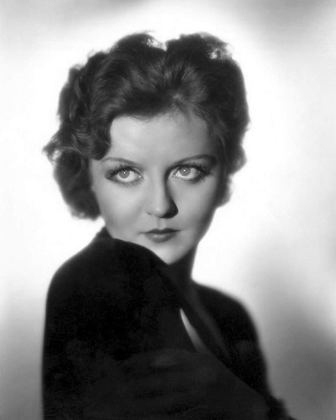 Nancy Carroll, foto pubblicitaria